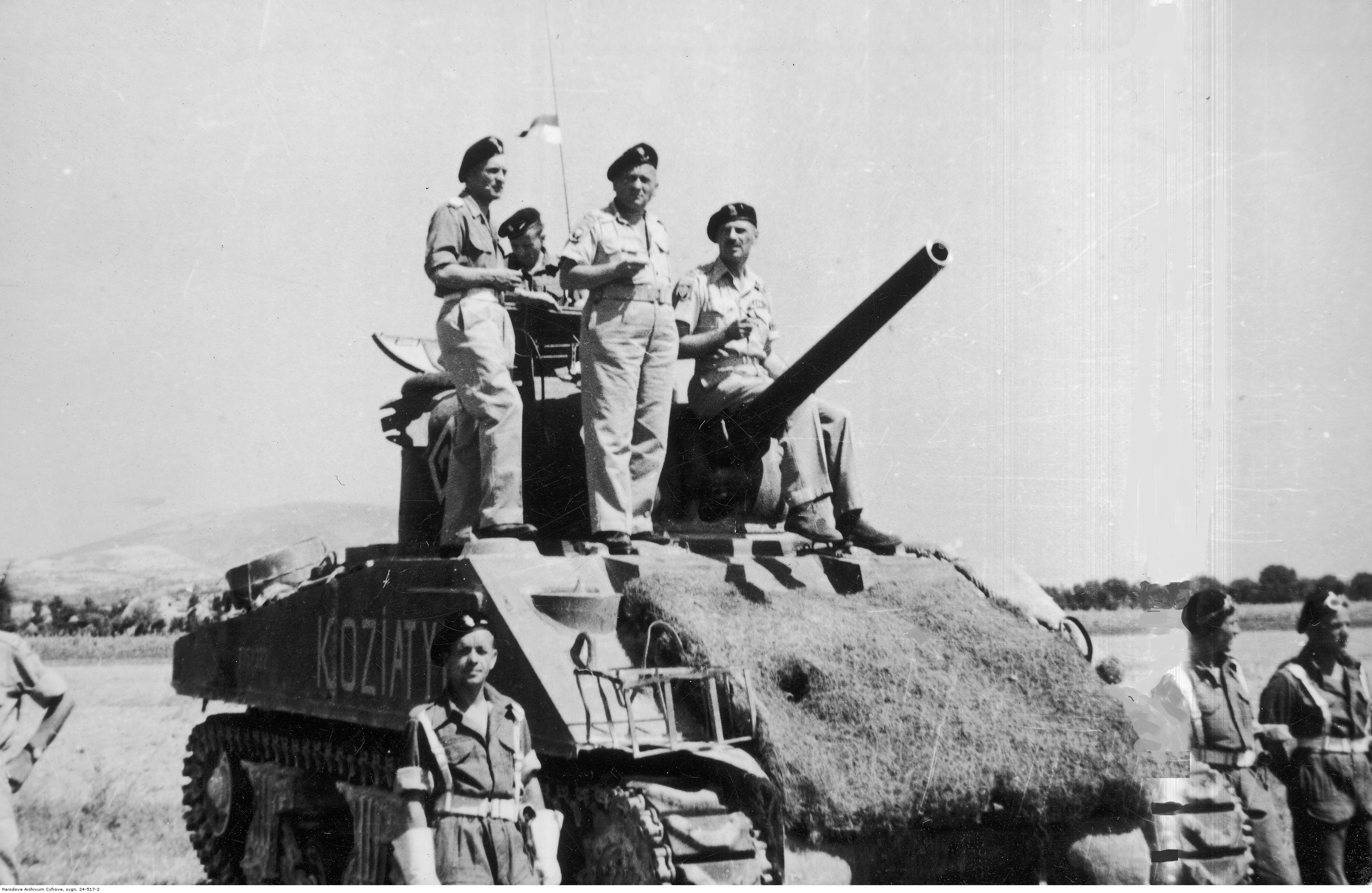 Żołnierze 2 Korpusu Polskiego po bitwie o Bolonię. Pełniący obowiązki Naczelnego Wodza gen. Władysław Anders (1. z prawej) na wieży czołgu M4 Sherman, w towarzystwie m.in. gen. Bronisława Rakowskiego (stoi 2. z lewej). Archiwum Fotograficzne Tadeusza Szumańskiego. Sygnatura: 24-517-2. Czołg "Koziatyń" należy do pocztu dowódcy 1 pułku ułanów krechowieckich